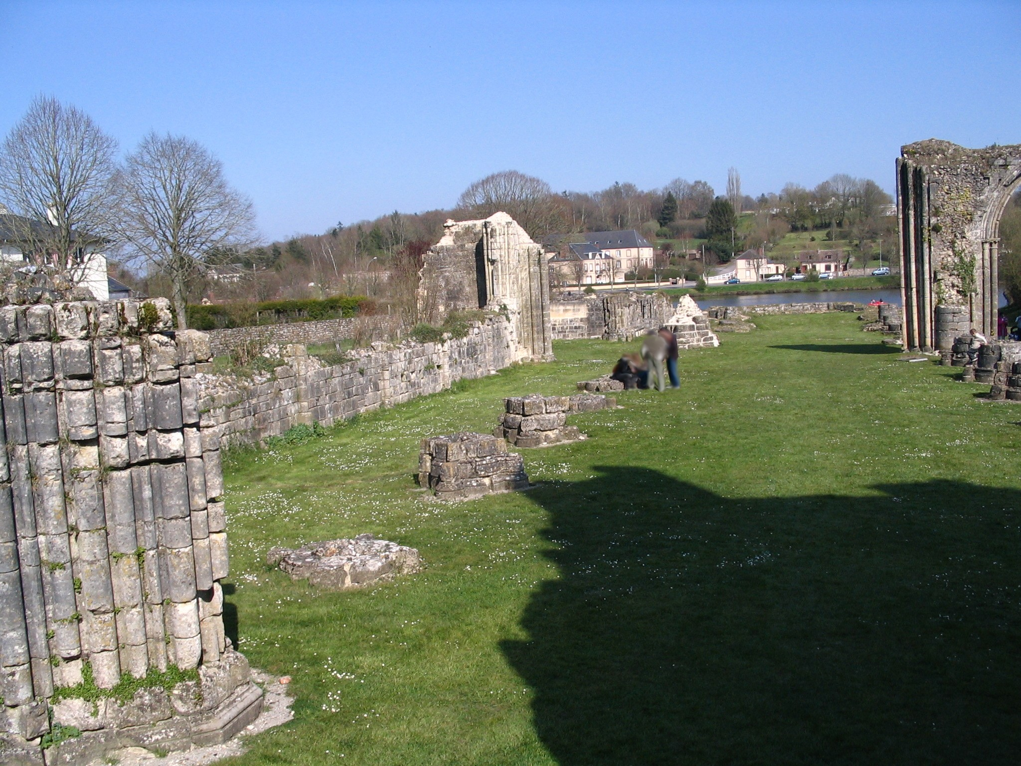 Ruine Abbaye(Saint-Evroult-Notre-Dame-du-Bois, Orne ,France)